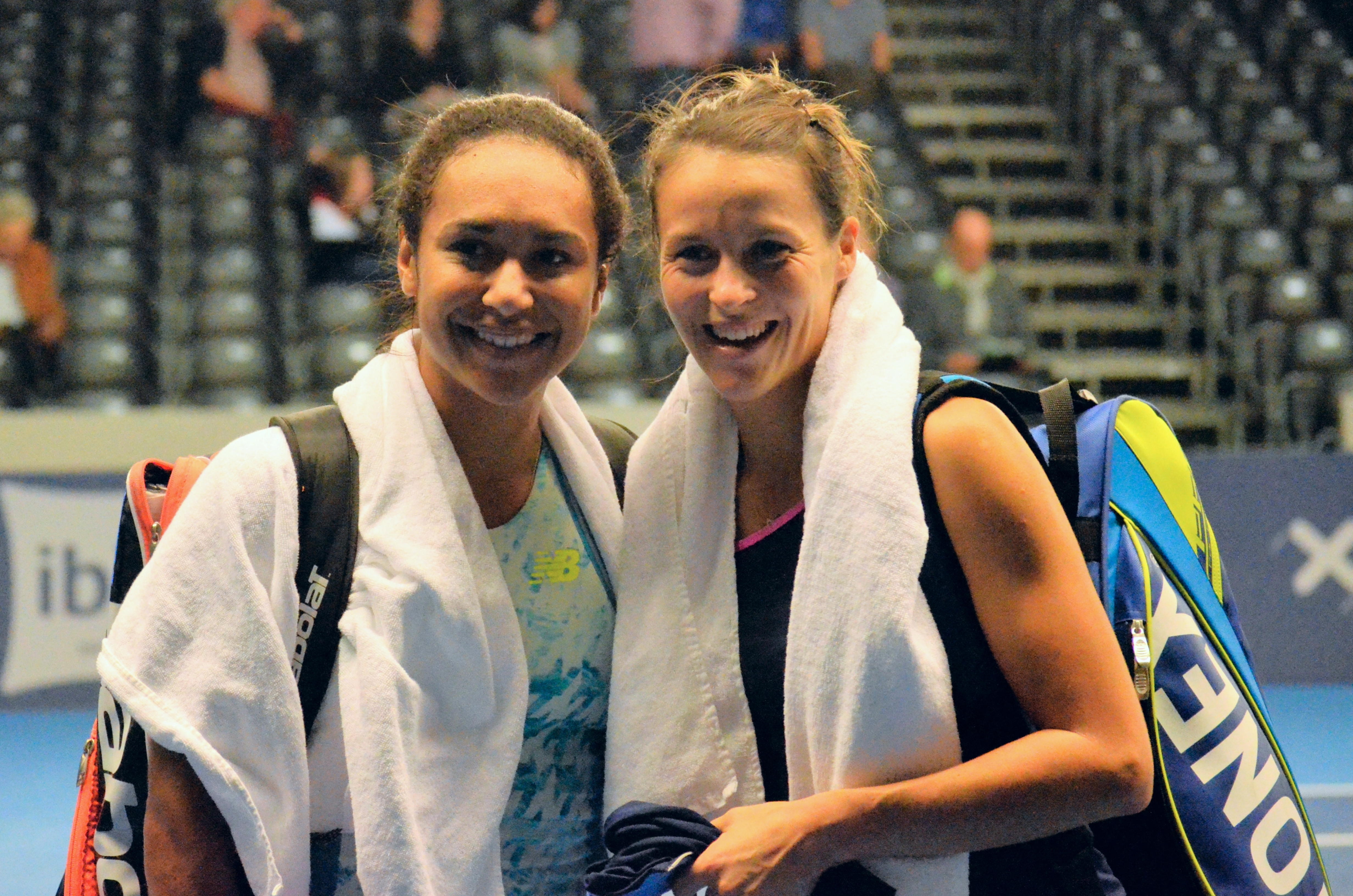 d. Sandra Klemenschits/Carina Witthöft 6-2 6-1